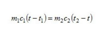 formula